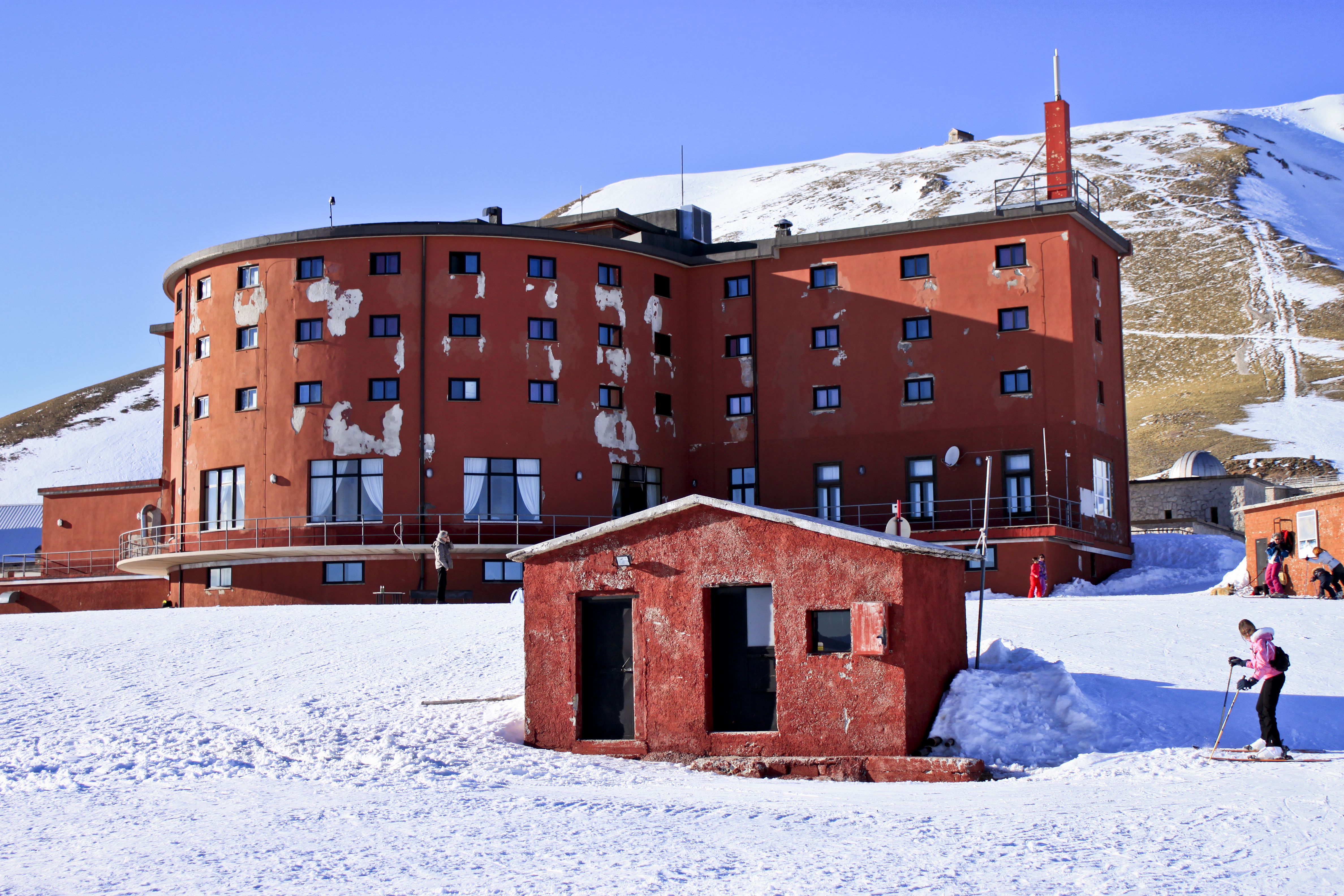 Fotografia di Gabriele Altimari